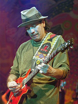 Carlos Santana am 21. Januar 2000 in München, Muffat-Halle